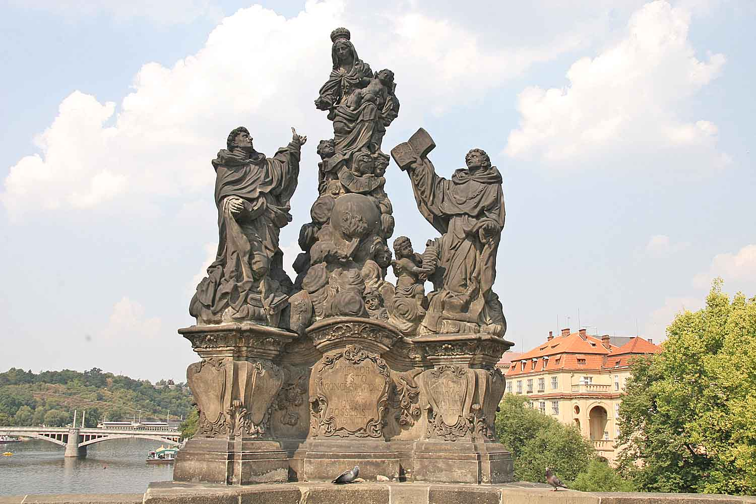 Česky: Sousoší Madony a Sv. Dominika a Tomáše na Karlově mostě